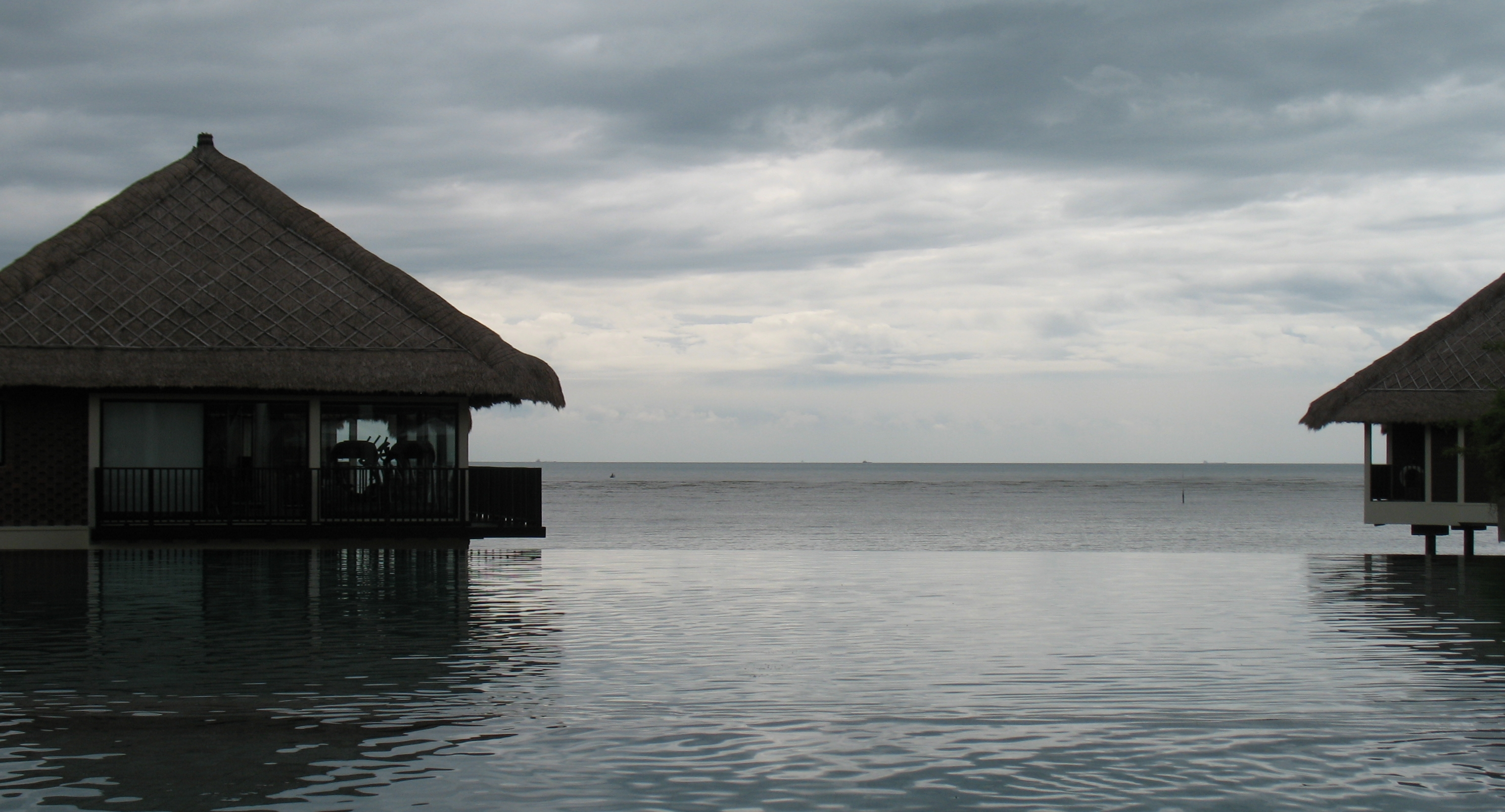 Bagan Lalang, 2 water levels